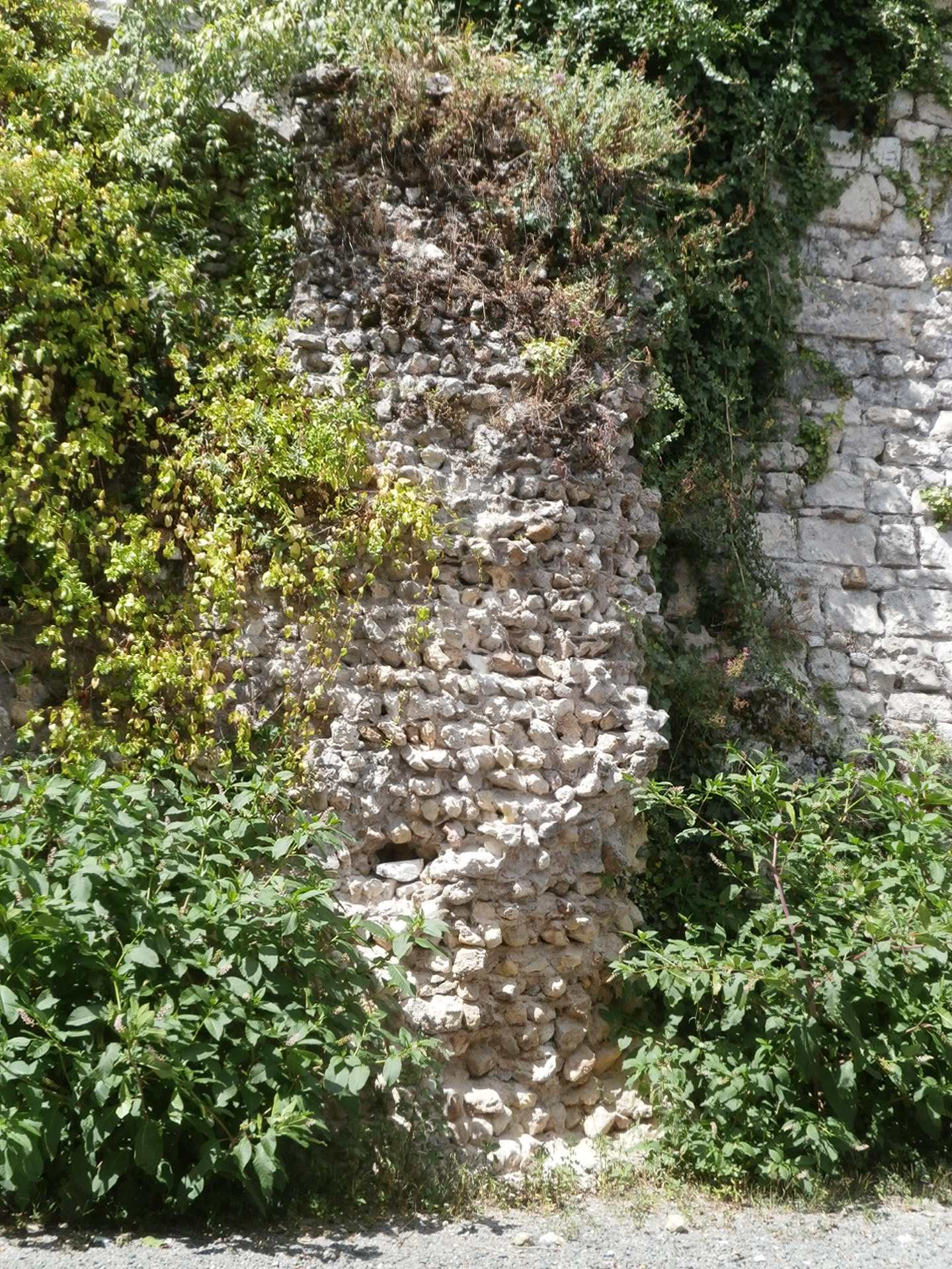 Vestige du mur extérieur de l'amphithéâtre de Tours